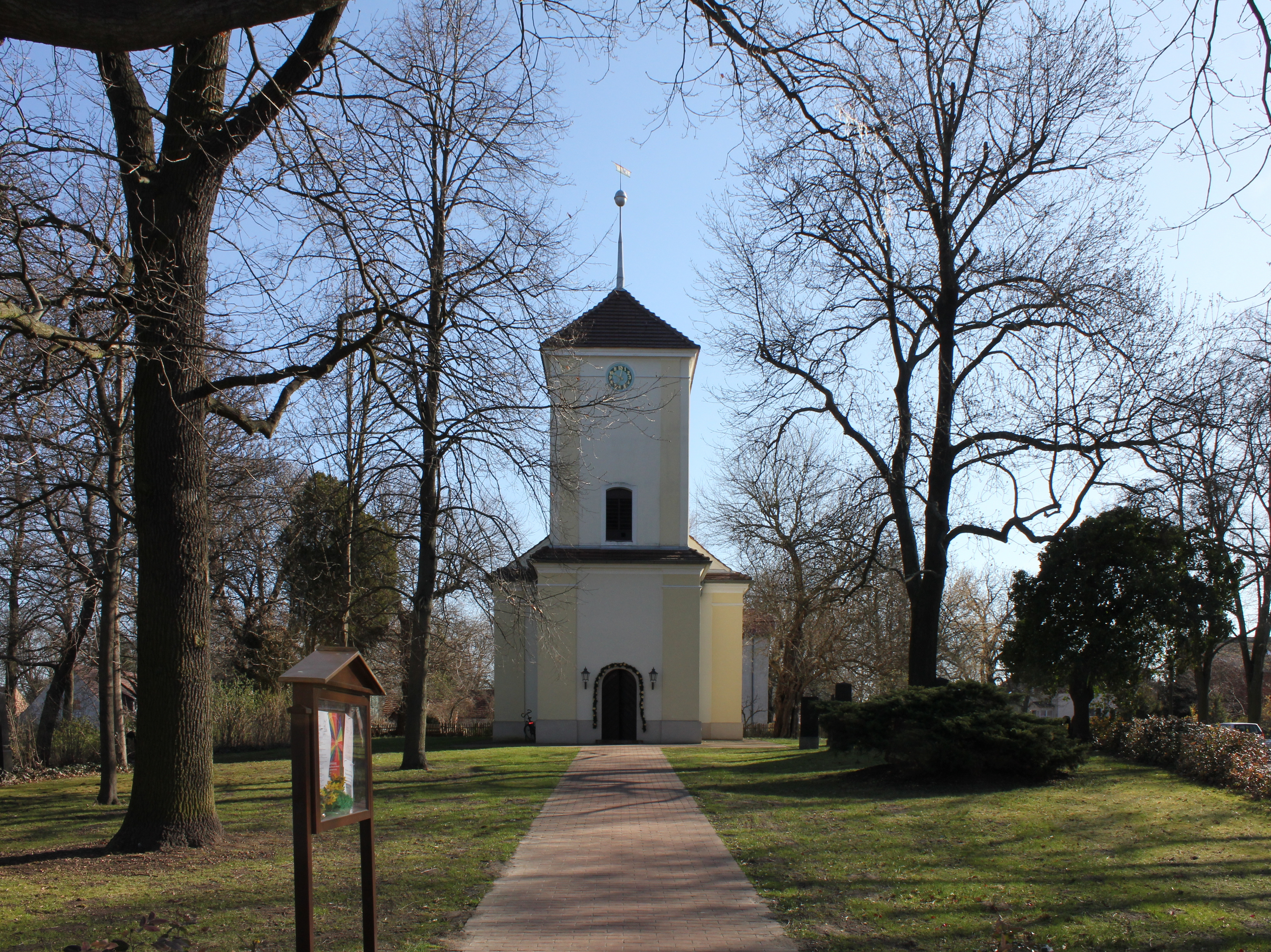 Ev. Dorfkirche